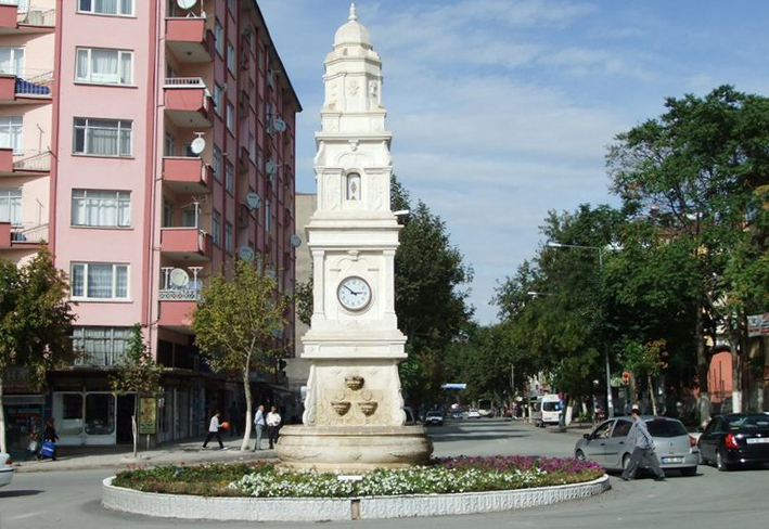 Malatya'da yeni yapılan saat kulesi